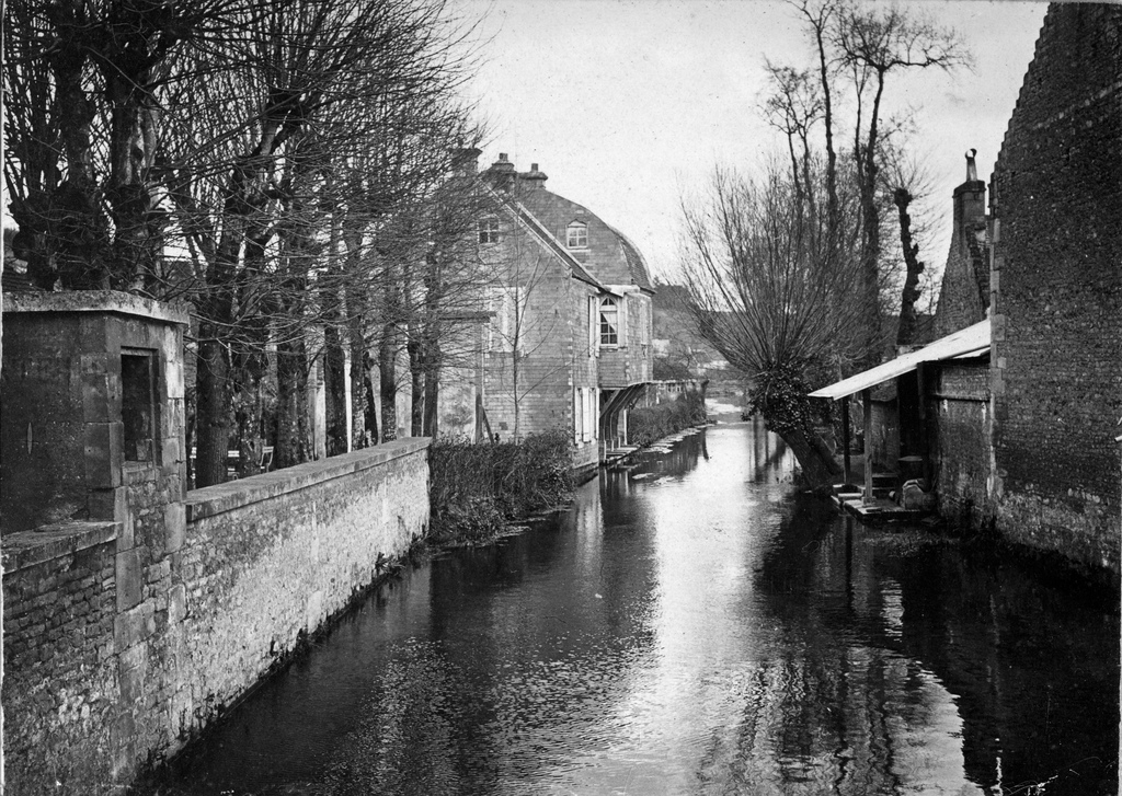 teinturerie de Clopée à Mondeville (Calvados, Basse-Normandie), détruite pendant l'été 2012.